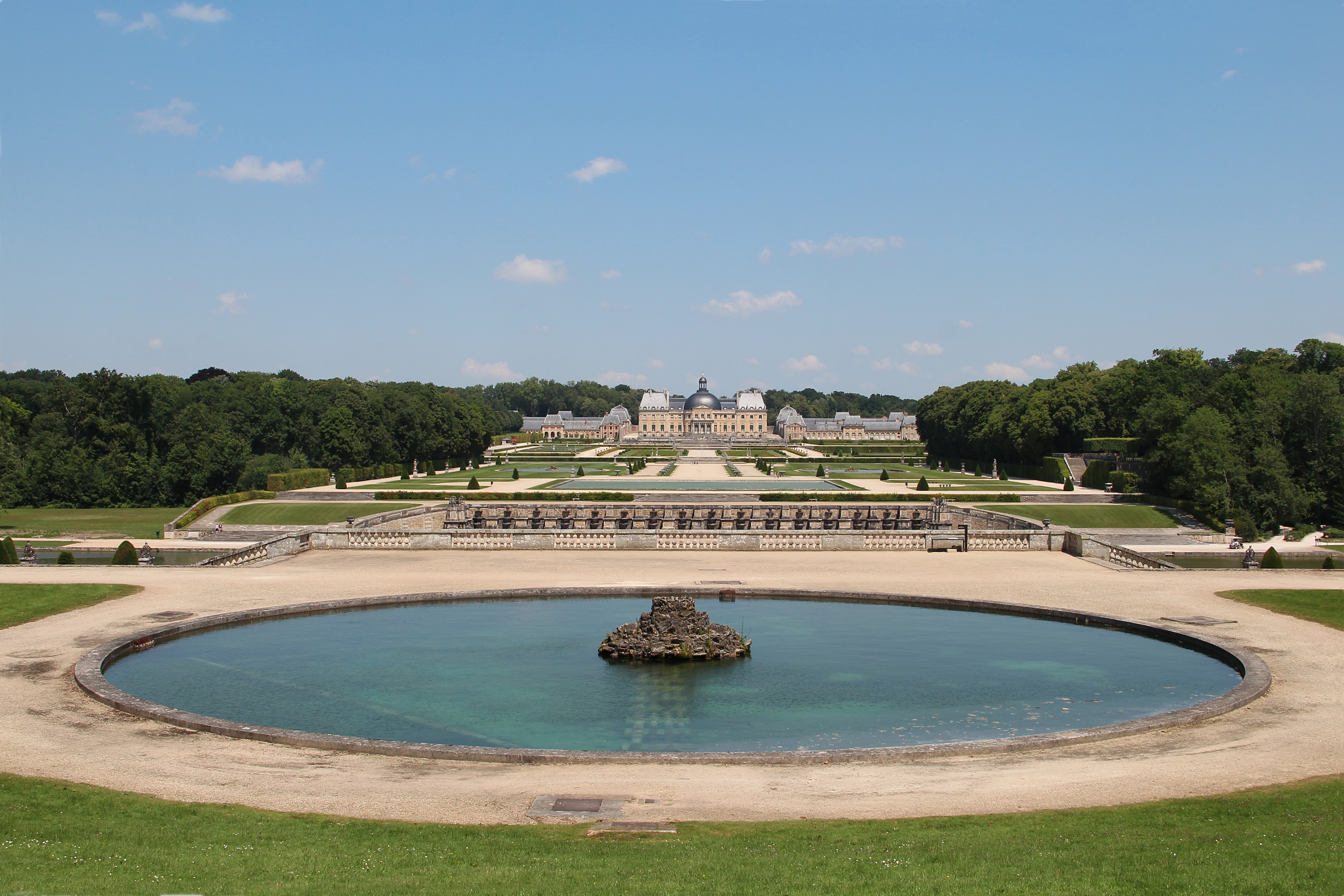 Bassin de la Gerbe, jardins et château de Vaux-le-Vicomte - Maincy (Seine-et-Marne, France).